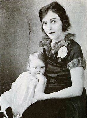 ZaSu Pitts e sua figlia Ann Gallery